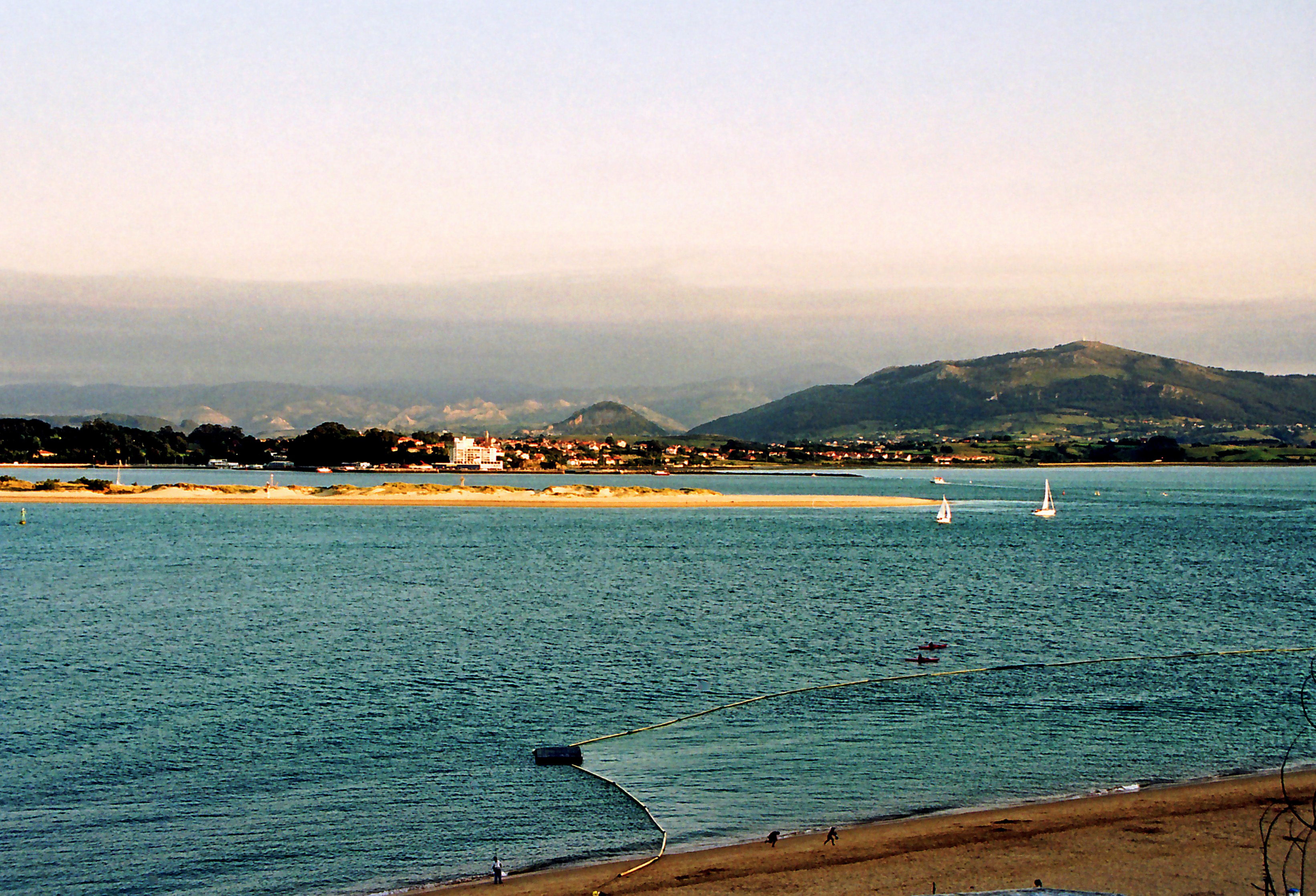 Bahía de Santander (Cantabria, España). En primer término la playa de los Peligros, a continuación la barra de arena de El Puntal y al fondo la localidad de Pedreña y el macizo de Peña Cabarga.